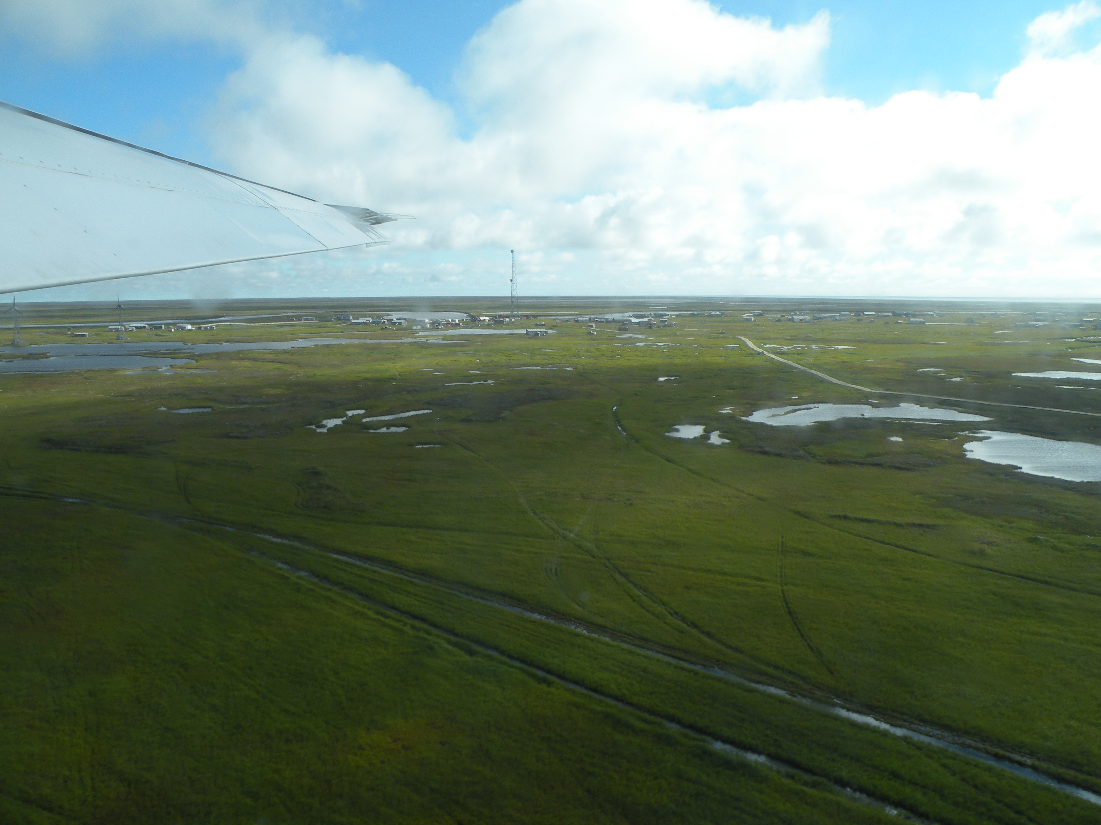 Flying into Kwigillingok